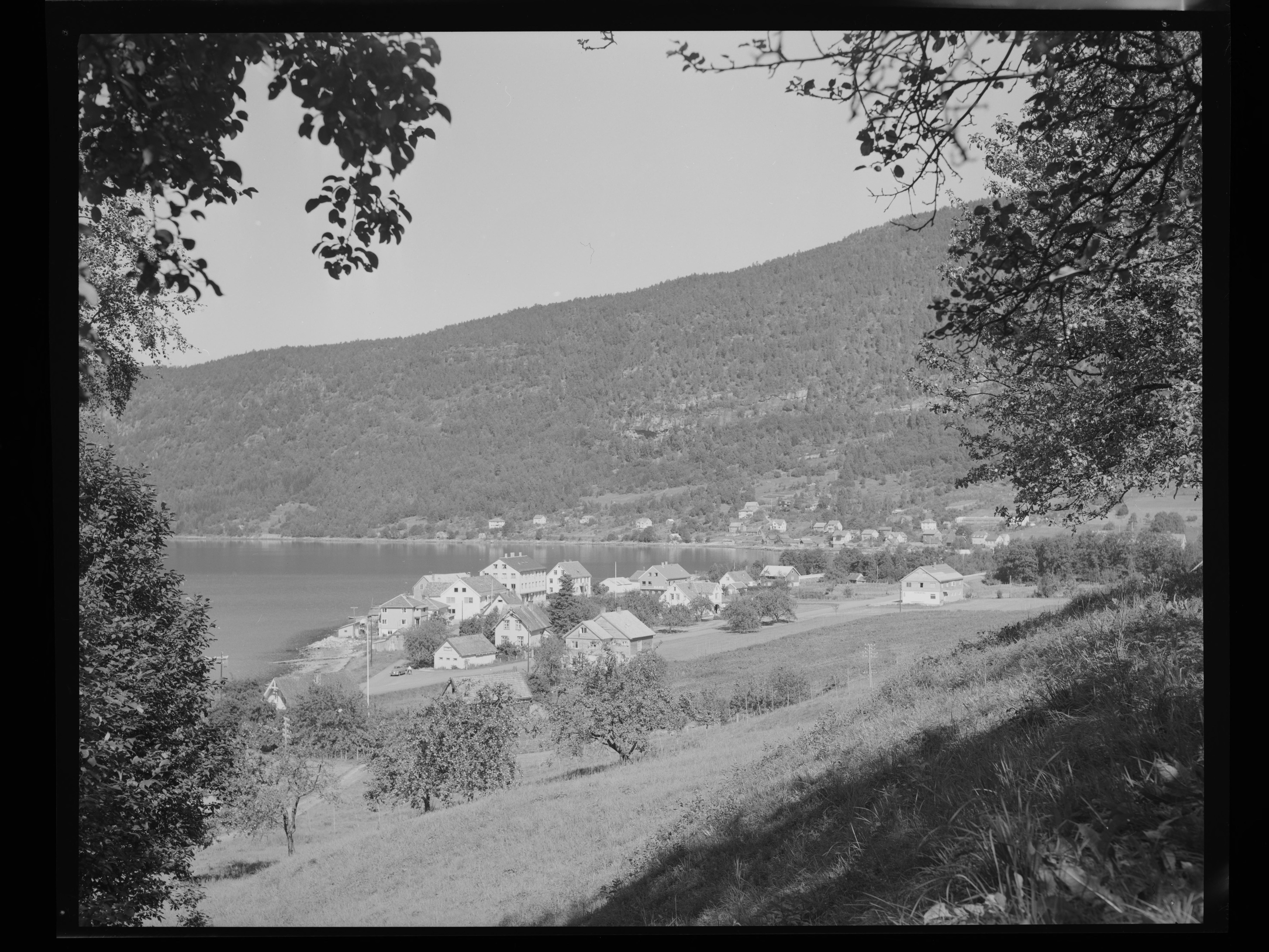 Bildet er hentet fra Nasjonalbibliotekets bildesamling. Anmerkninger til bildet var: Fotograf: ÅM Innvik, Stryn, Sogn og Fjordane